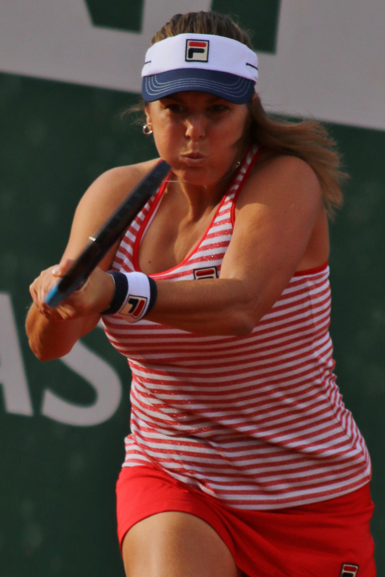 Tatishvili RG19 (12)